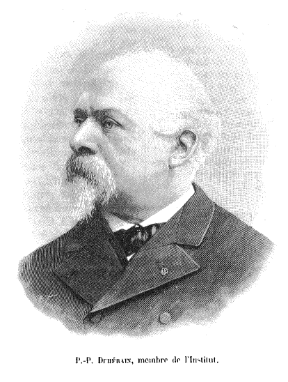 Portrait de Pierre Paul de Dehérain paru dans la revue La Nature du 13 décembre 1902